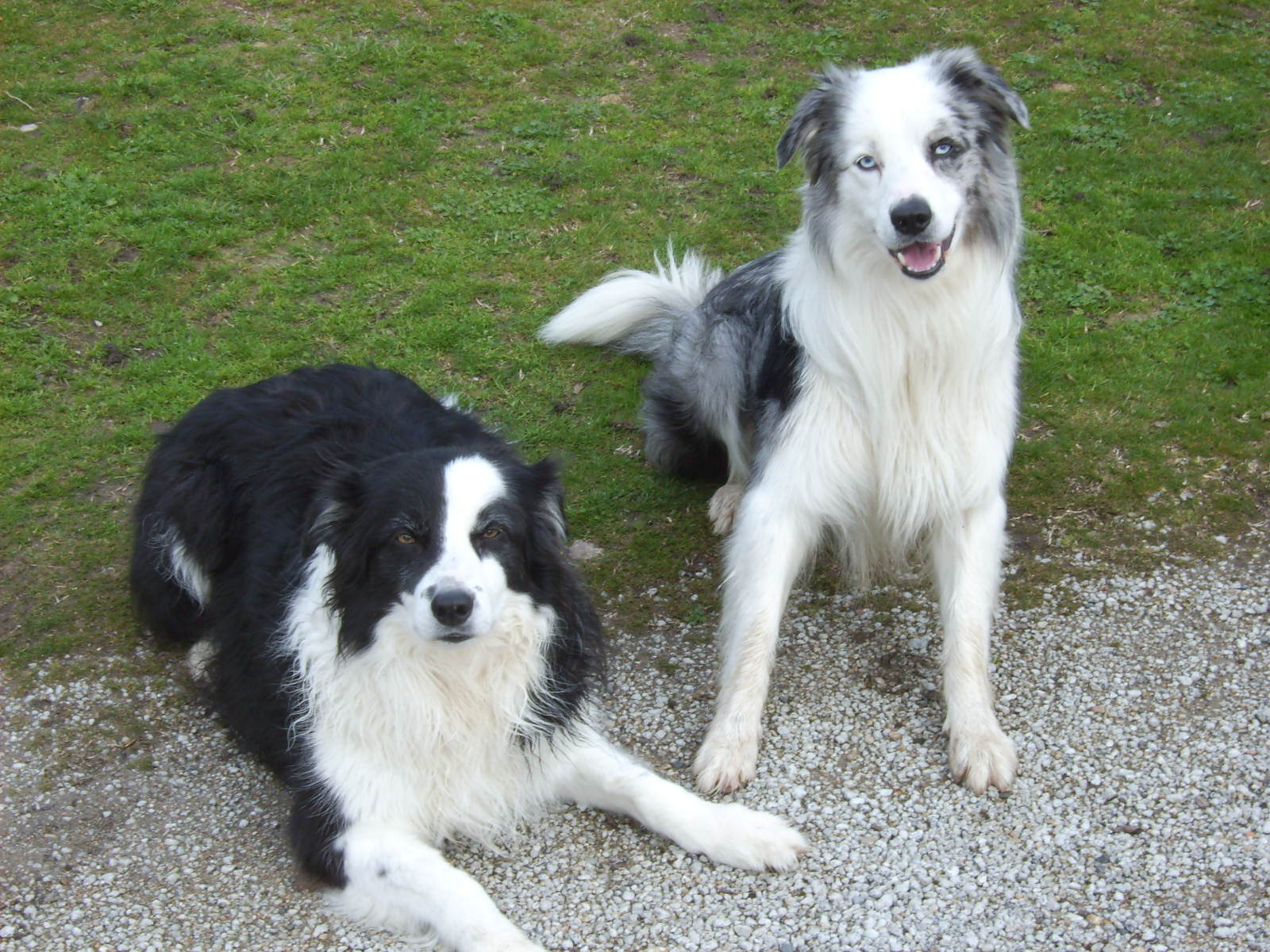 Photo de 2 border collie 1 noir et blanc et 1 bleu merle